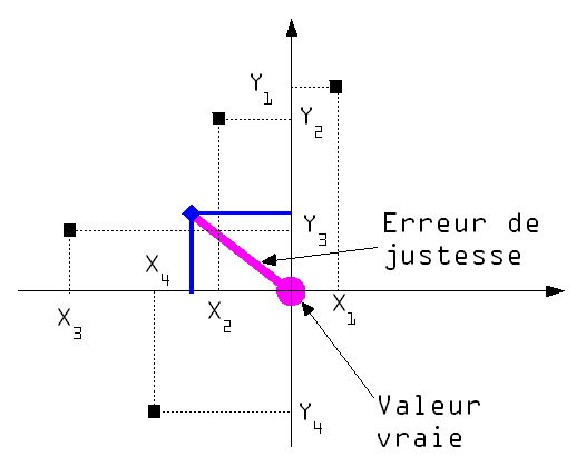 représentation dans un espace en deux dimension de la notion de justesse en métrologie.